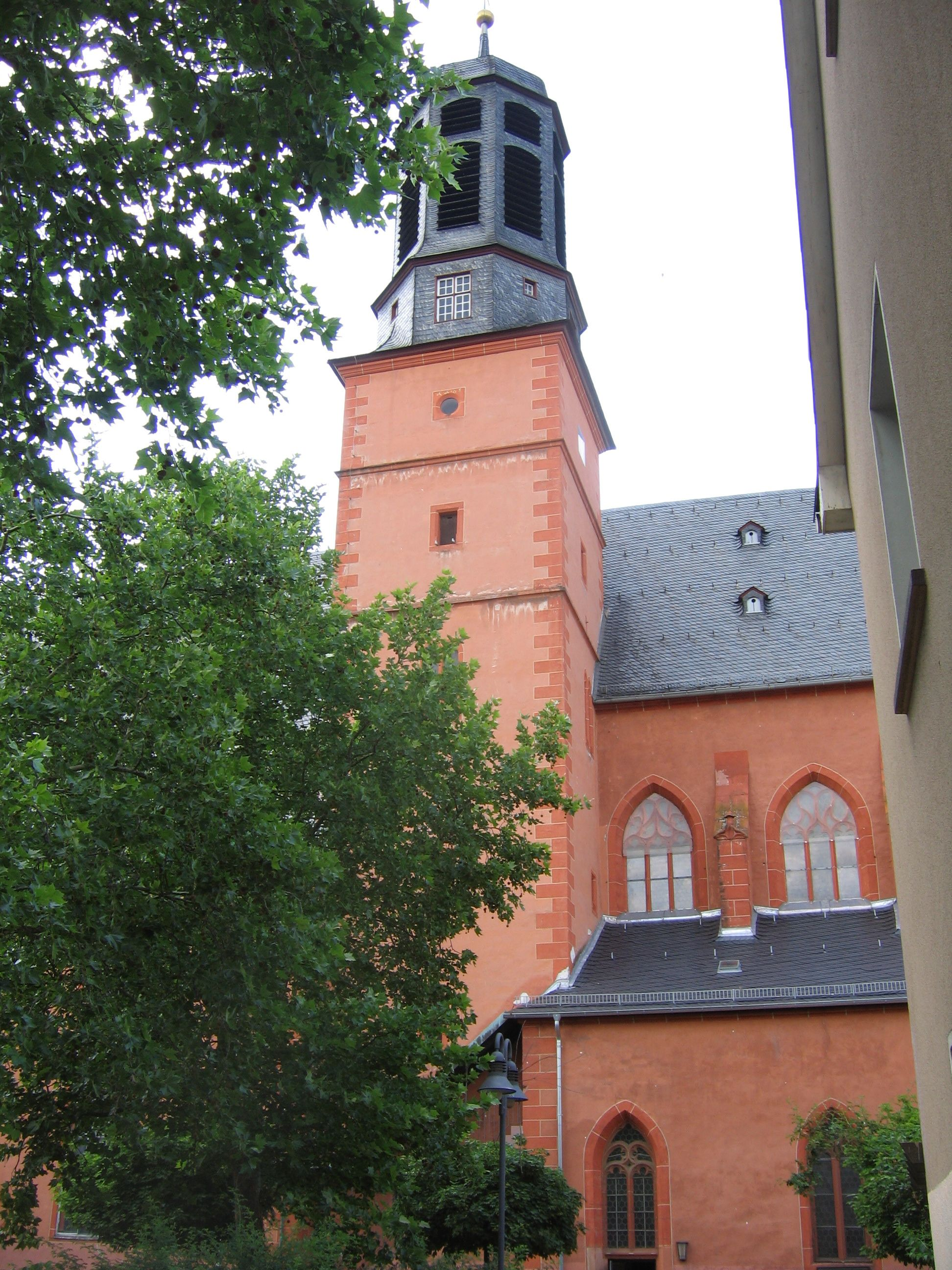 Marienkirche Hanau, Ansicht von Süden